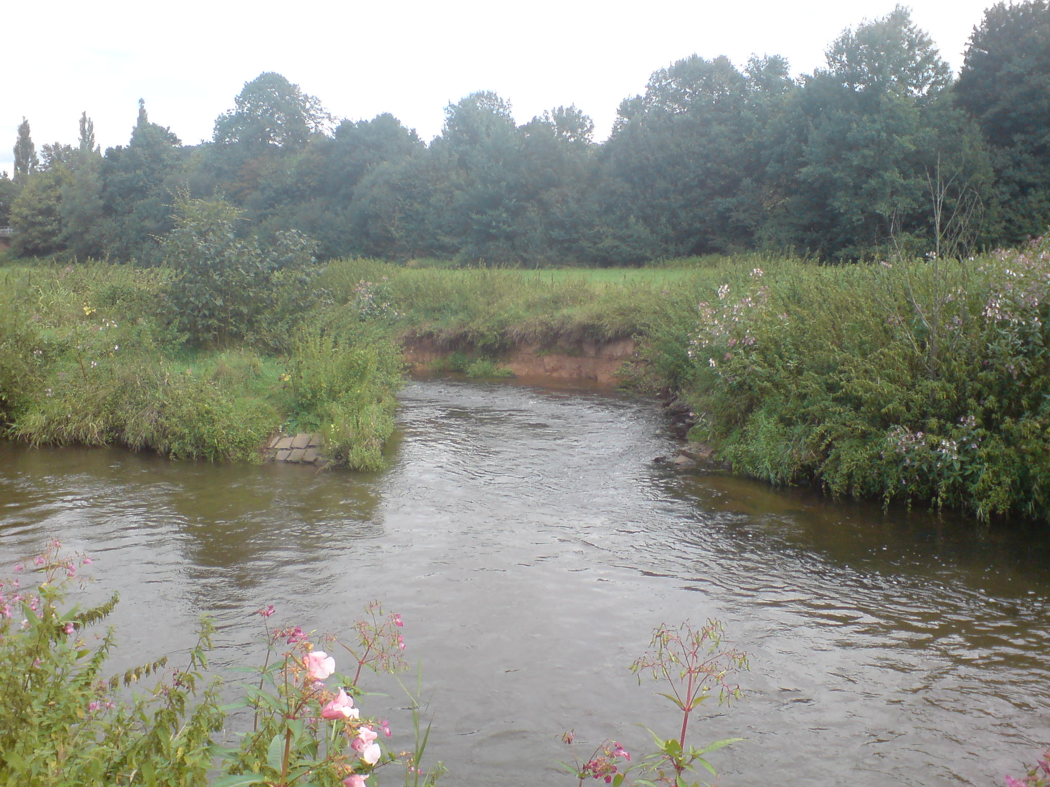 Die Mündung des Erbachs in die Blies